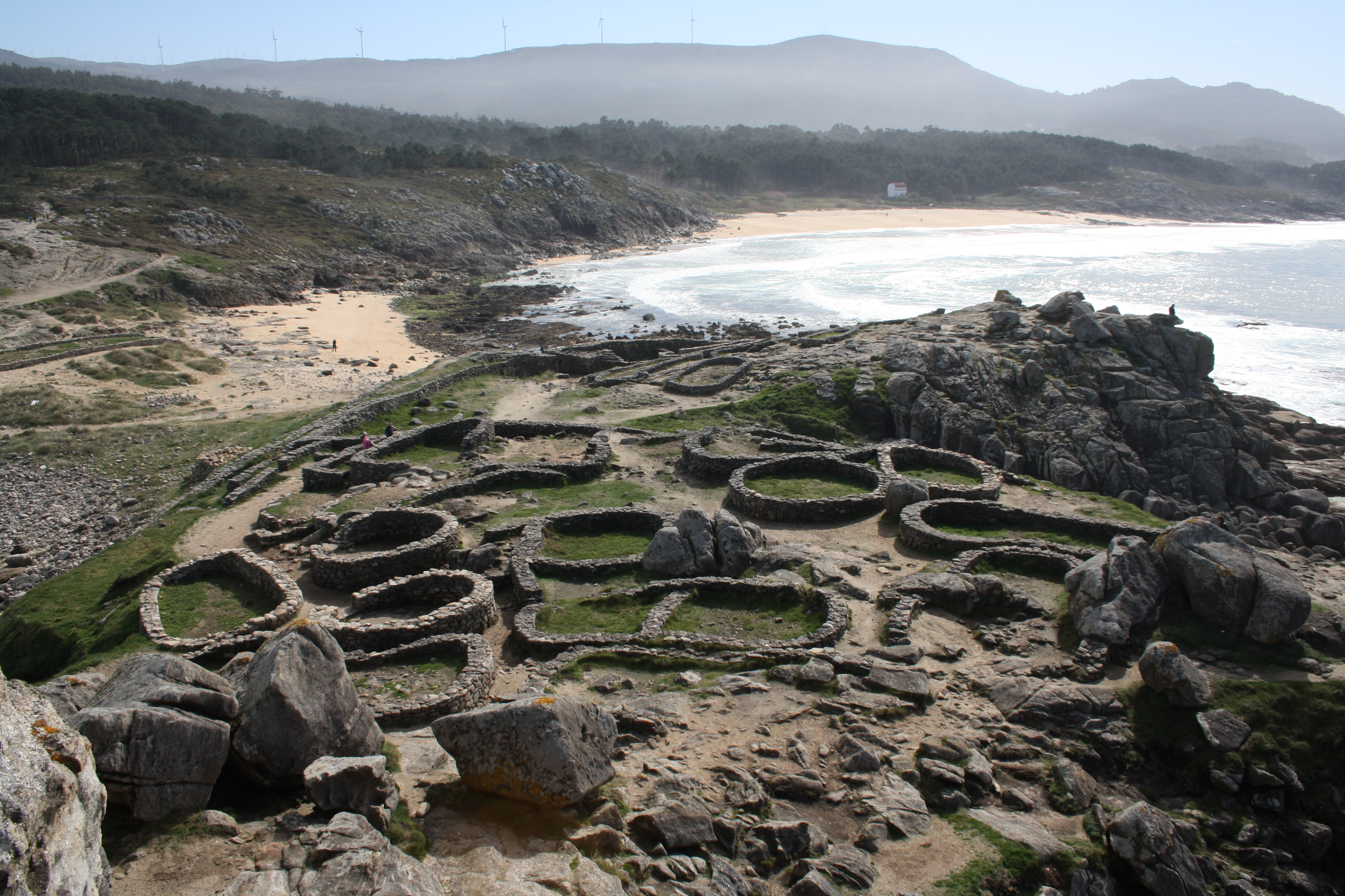 Castro de Baroña, vista desde arriba.